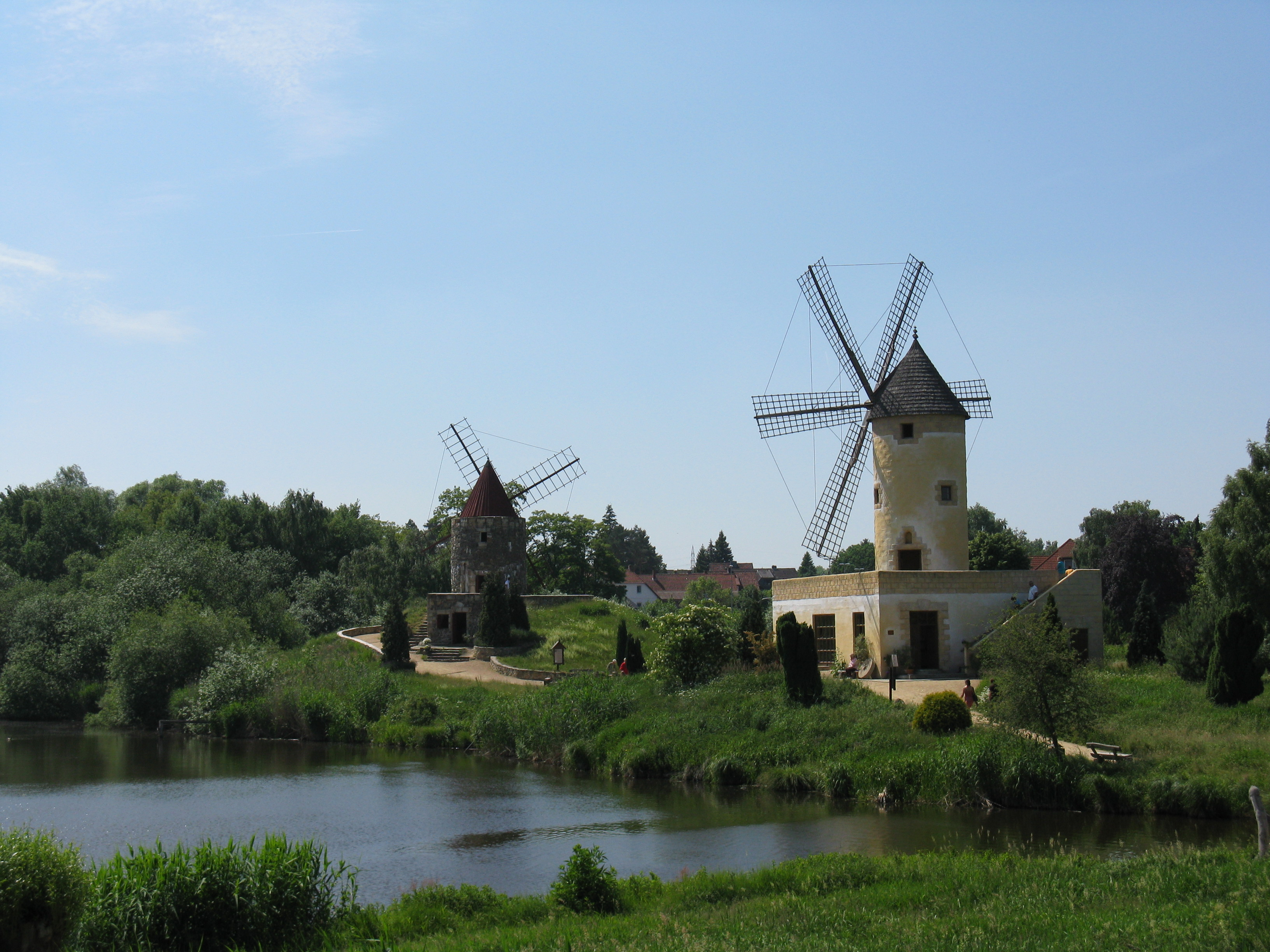 Mühlenmuseum Gifhorn: provencalische und mallorcinische Mühlen